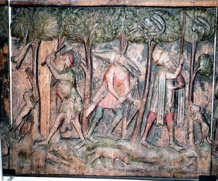 Stralsund (Germany), Nikolaikirche, Russlandfahrergestühl, Tafel (AB) C (D) Fotograf: Klugschnacker, 2006-07-xx